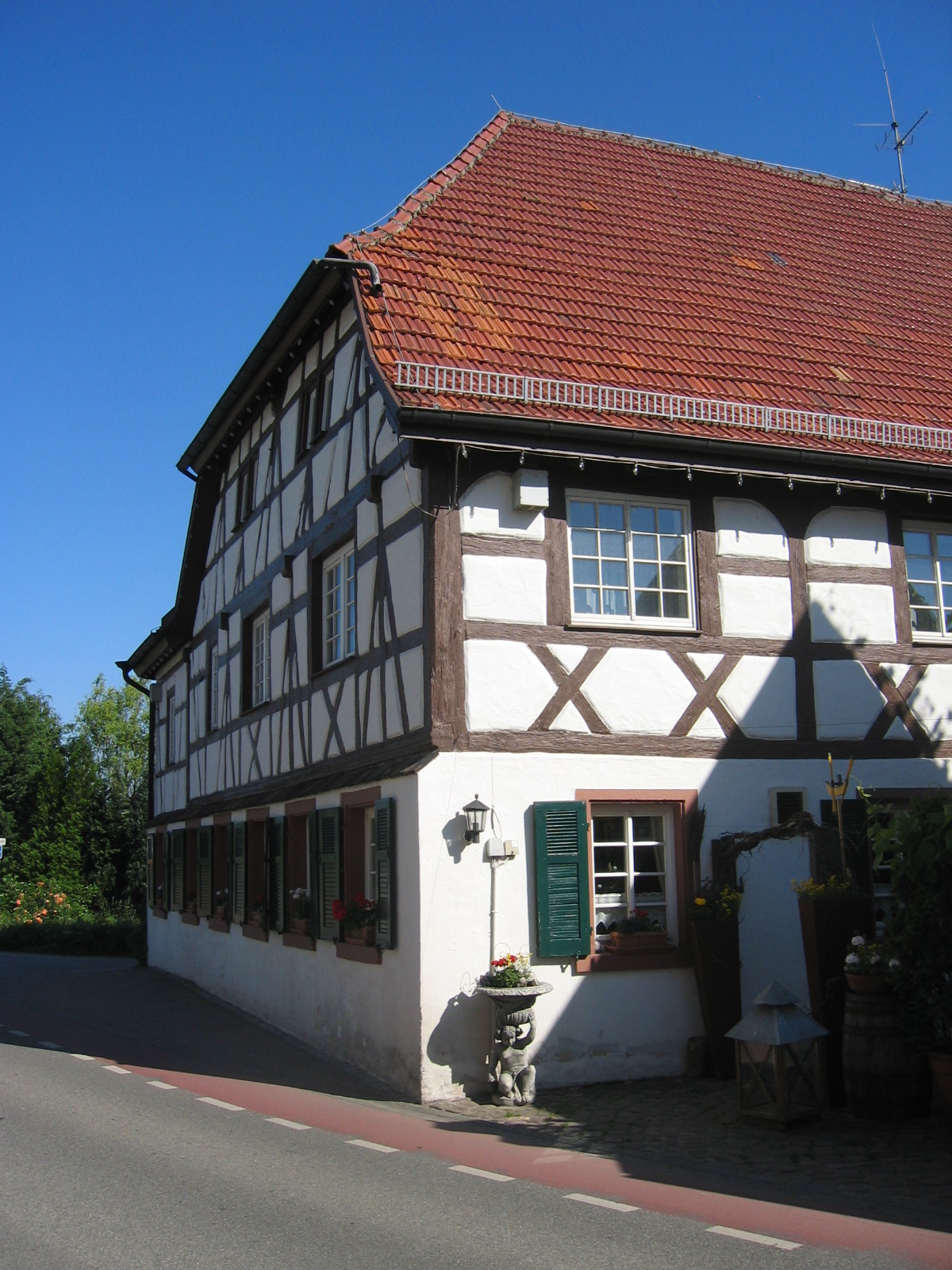 Gasthaus „Zum Löwen“ und Heimatmuseum in Reilingen